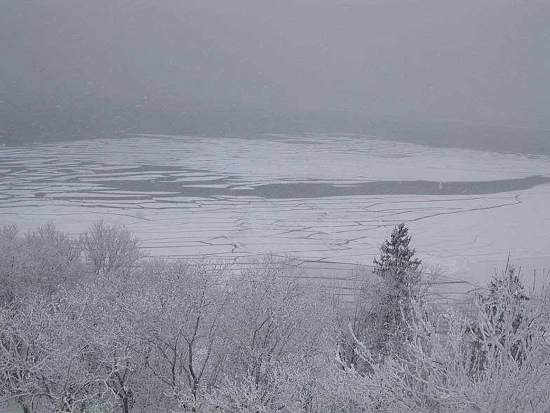 Toila, nella foto si vede il golfo finlandese d'inverno.